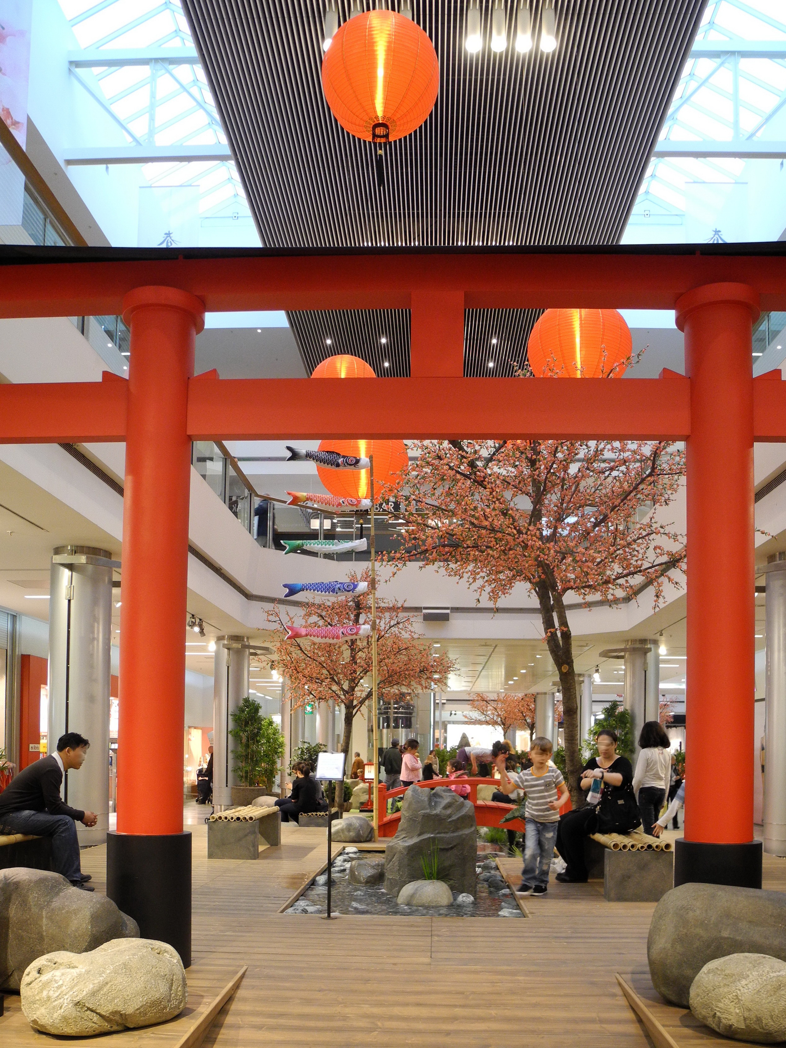 Hanami, Glattzentrum in Wallisellen (Switzerland)